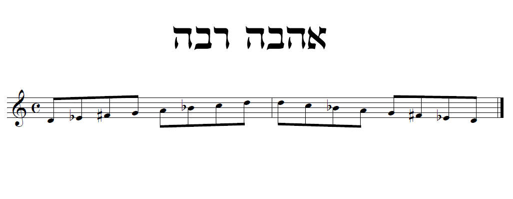 basic ahavah rabbah scale